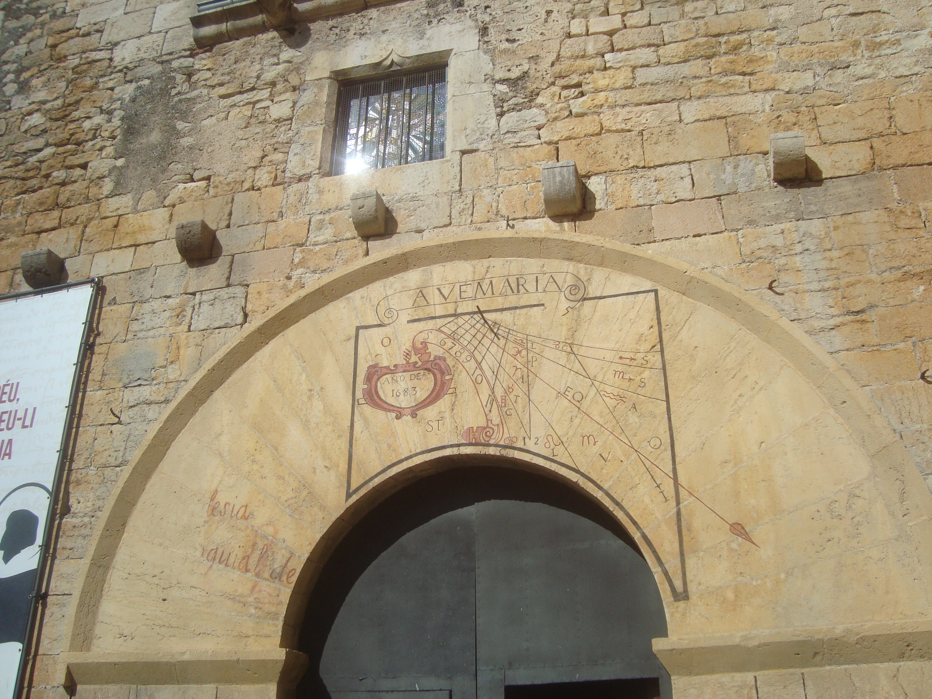 Iglesia Parroquial de la Asunción de María 02.042-007.